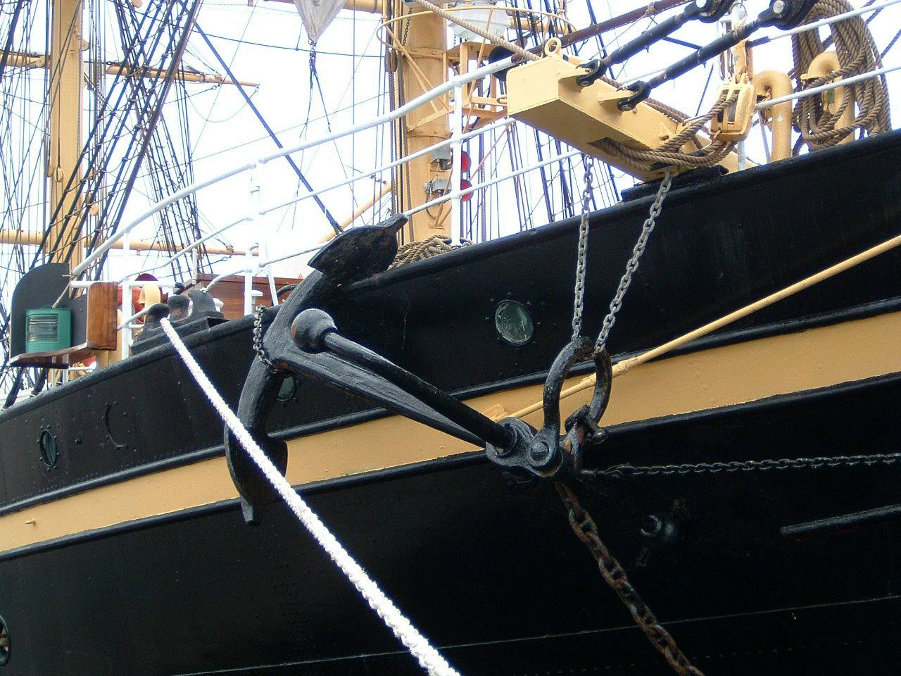 Bossoir d'ancre sur navire ancien.